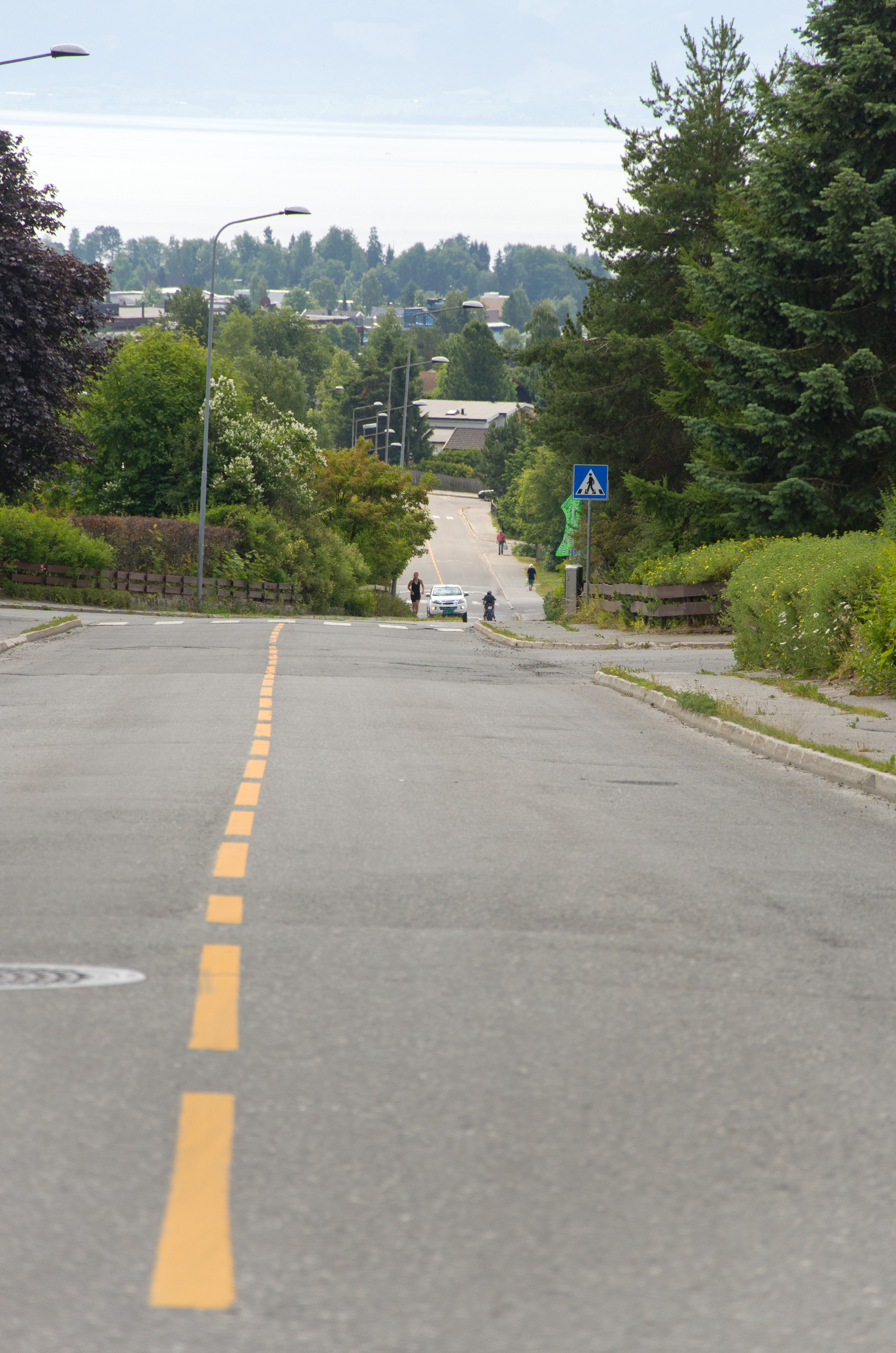 Fylkesvei 1770 Utfarten i Hamar